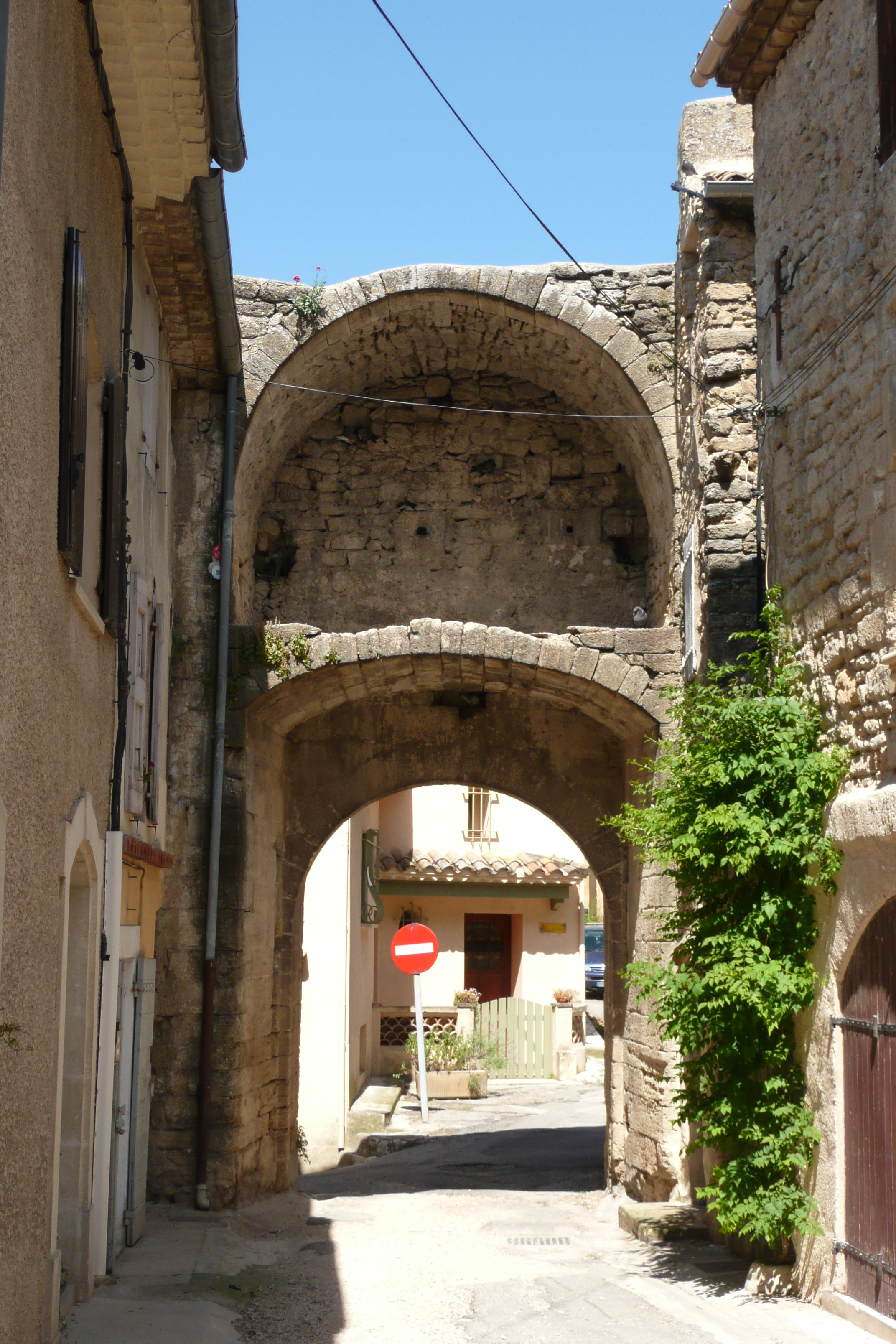 Enceinte médiévale de Cucuron (Vaucluse, France).